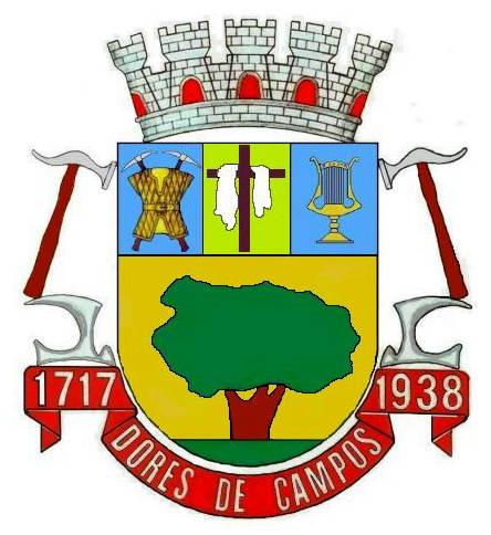 Brasão de armas do municí´pio de Dores de Campos, Minas Gerais, Brasil.